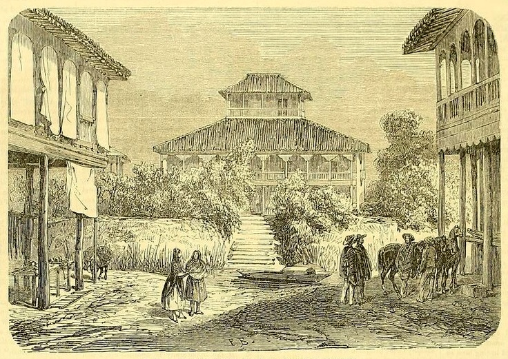 Grabado de la Hacienda La Elvira (1852), propiedad insignia de la familia Flores-Jijón de Vivanco. Fue el lugar al que se retiraron después de que Juan José Flores fue depuesto de la presidencia del Ecuador en dos ocasiones.